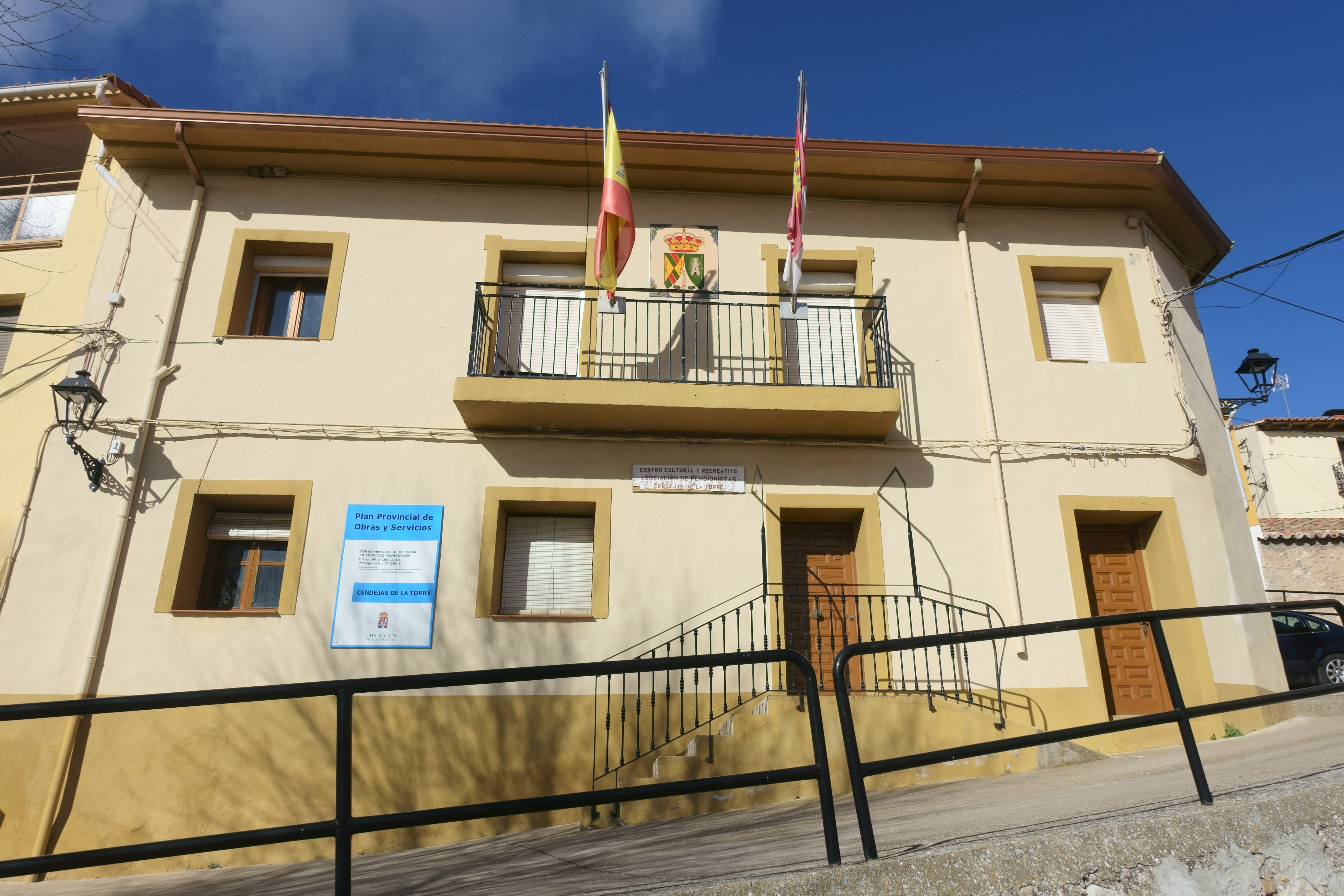 Casa consistorial de Cendejas de la Torre (Guadalajara, España).